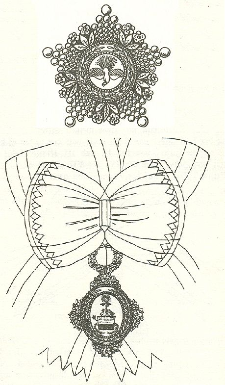 Scan van Blz. 195 en 197 van het boek "Handbuch der Ritter- und Verdienstorden " uitgegeven 1893 door Weber.Tekening van de in 1902 overleden Maximilian Gritzner. Robert Prummel 10 jul 2008 16:40 (CEST)